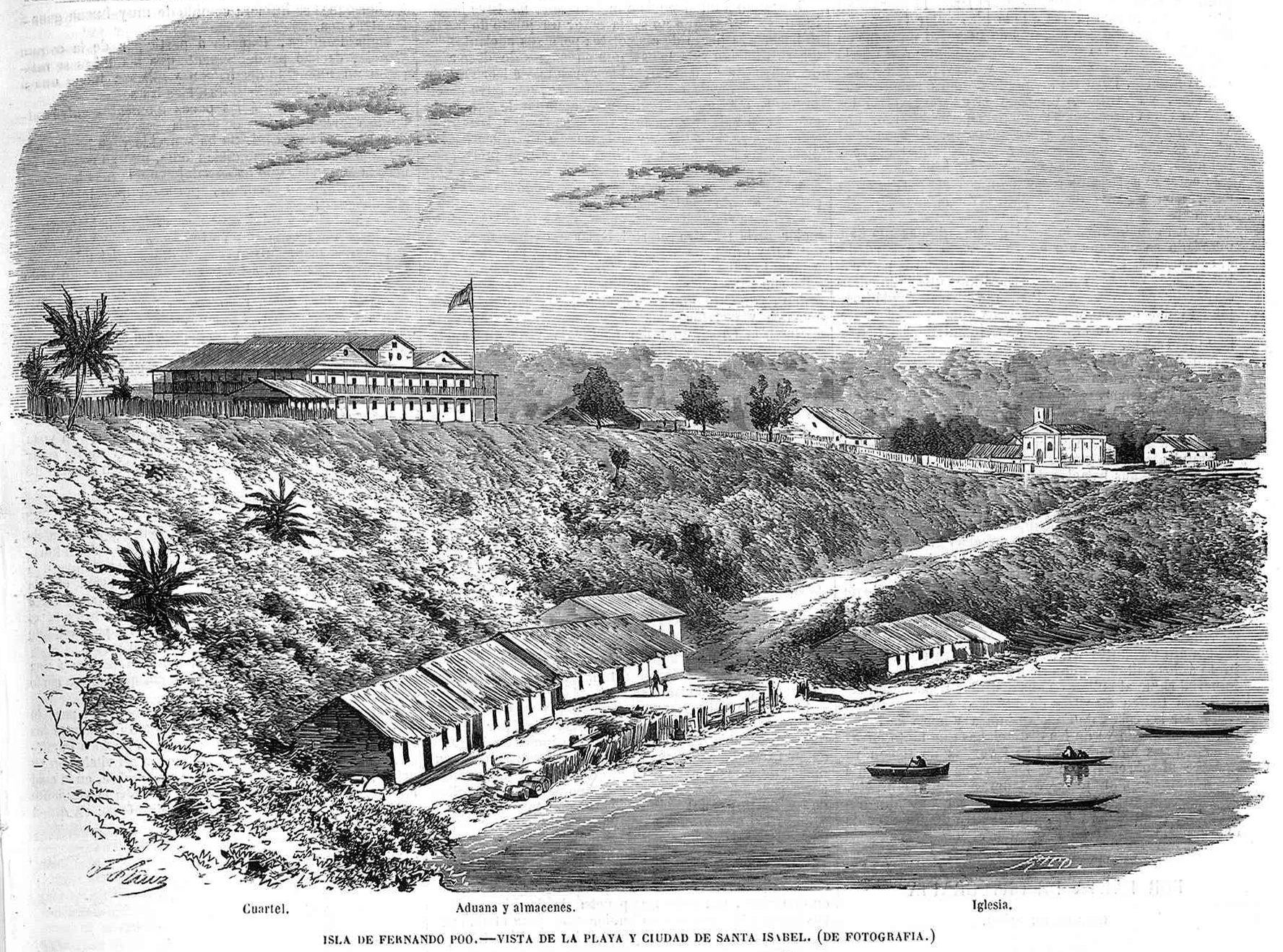 «Isla de Fernando Poo – Vista de la playa y ciudad de Santa Isabel (de fotografía)», en la revista española El Museo Universal.